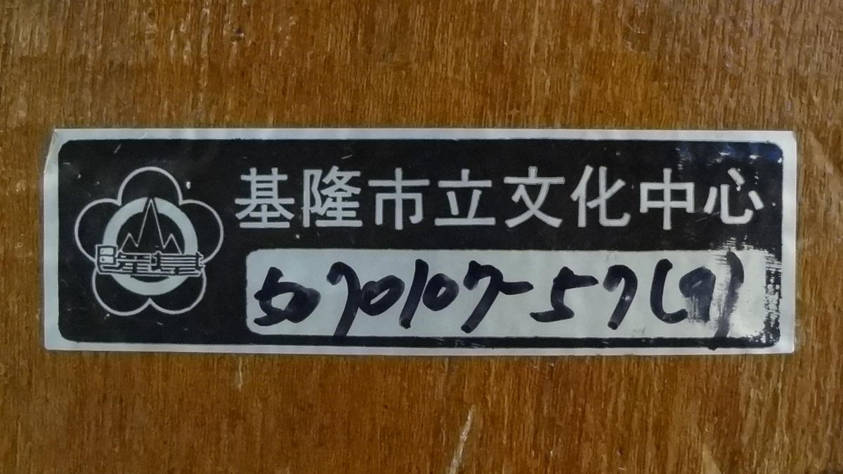 中文（台灣）: 基隆市立文化中心財產標籤，材質為塑膠貼紙，位於基隆文化中心內。